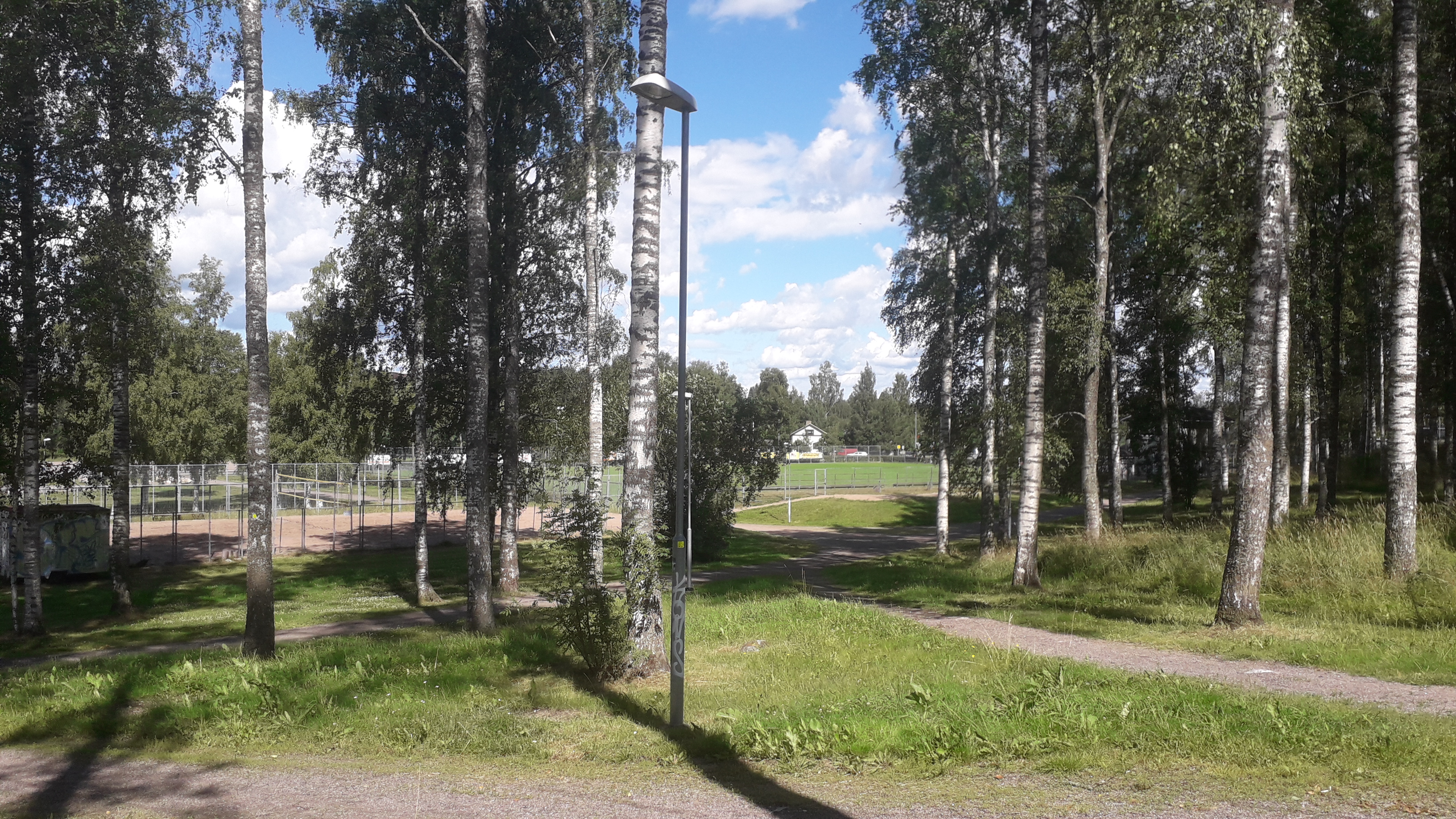 Riihimäen urheilupuistoa heinäkuussa 2020.